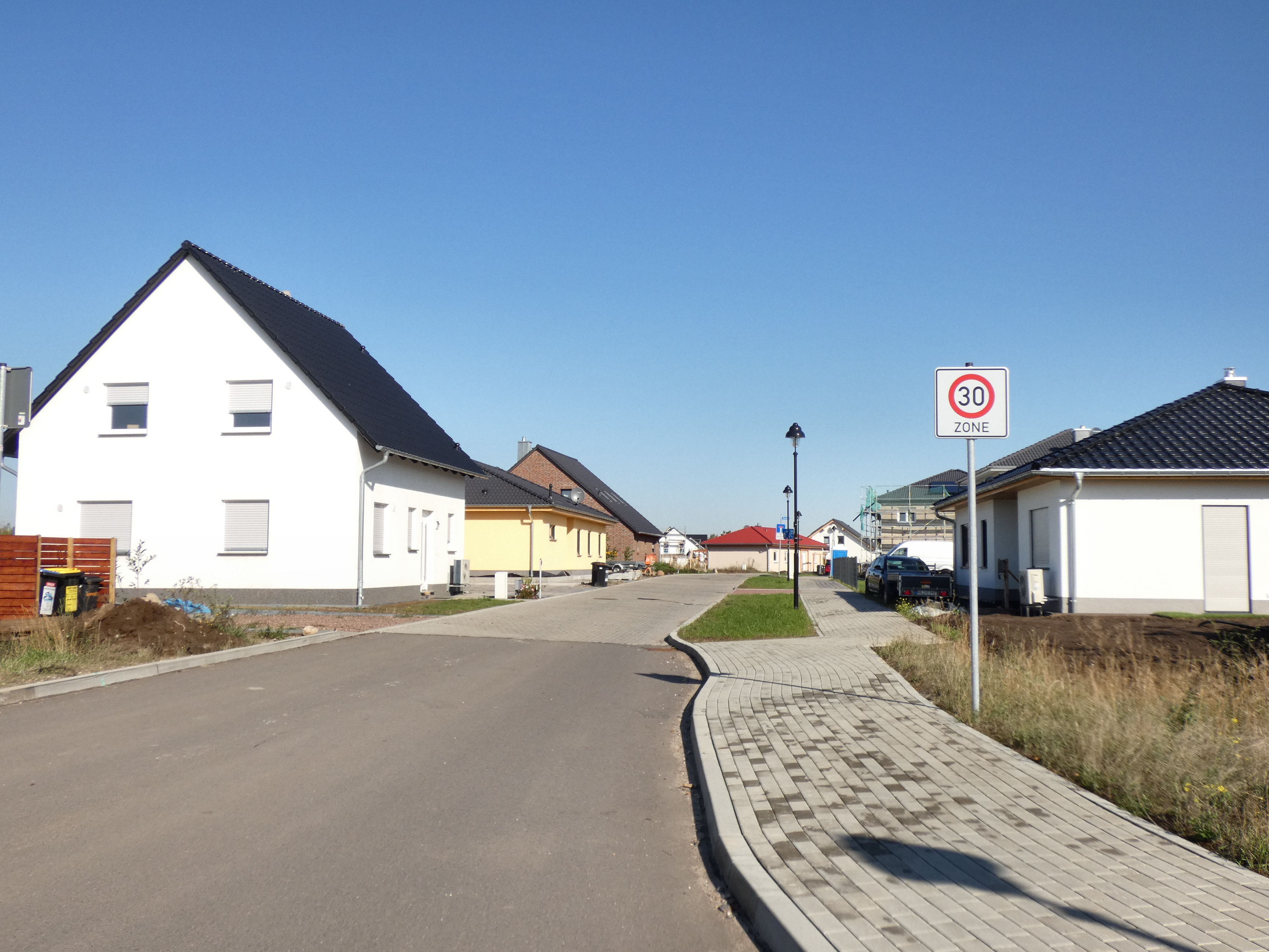 Hanfweg, Dautzsch, Halle (Saale)